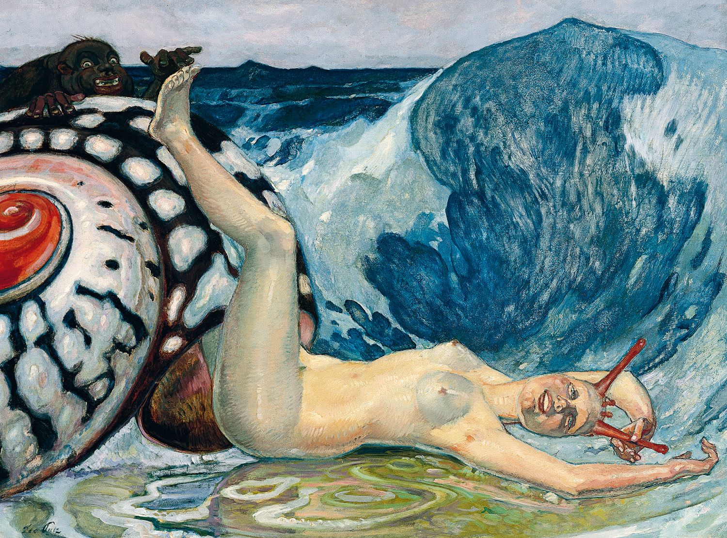 Leo Putz - Das kitzlige Schnecklein, 1904; Öl auf Holz, 75 × 95 cm; Sammlung Siegfried Unterberger